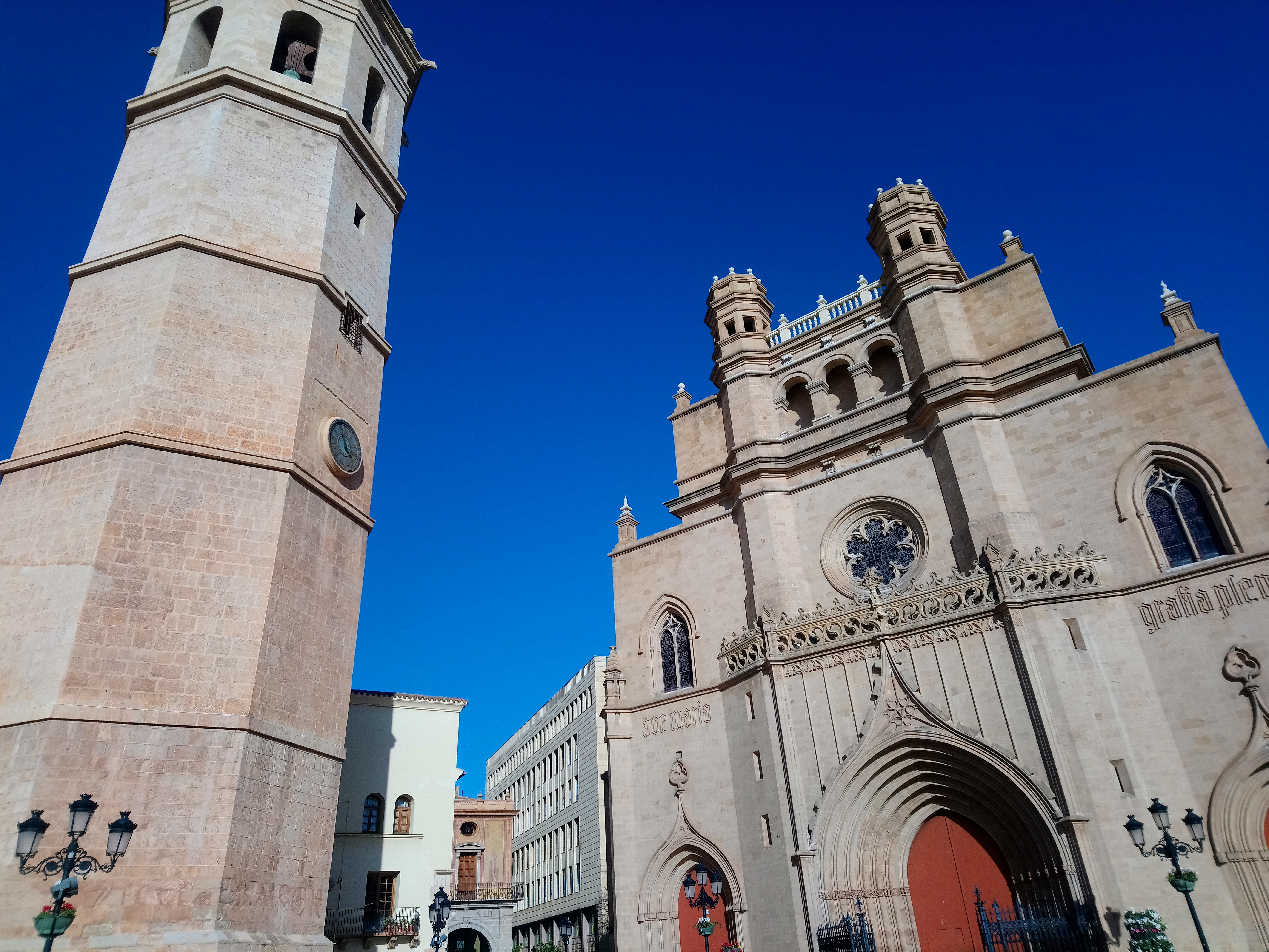 El Fadrí con la Catedral de Castellón